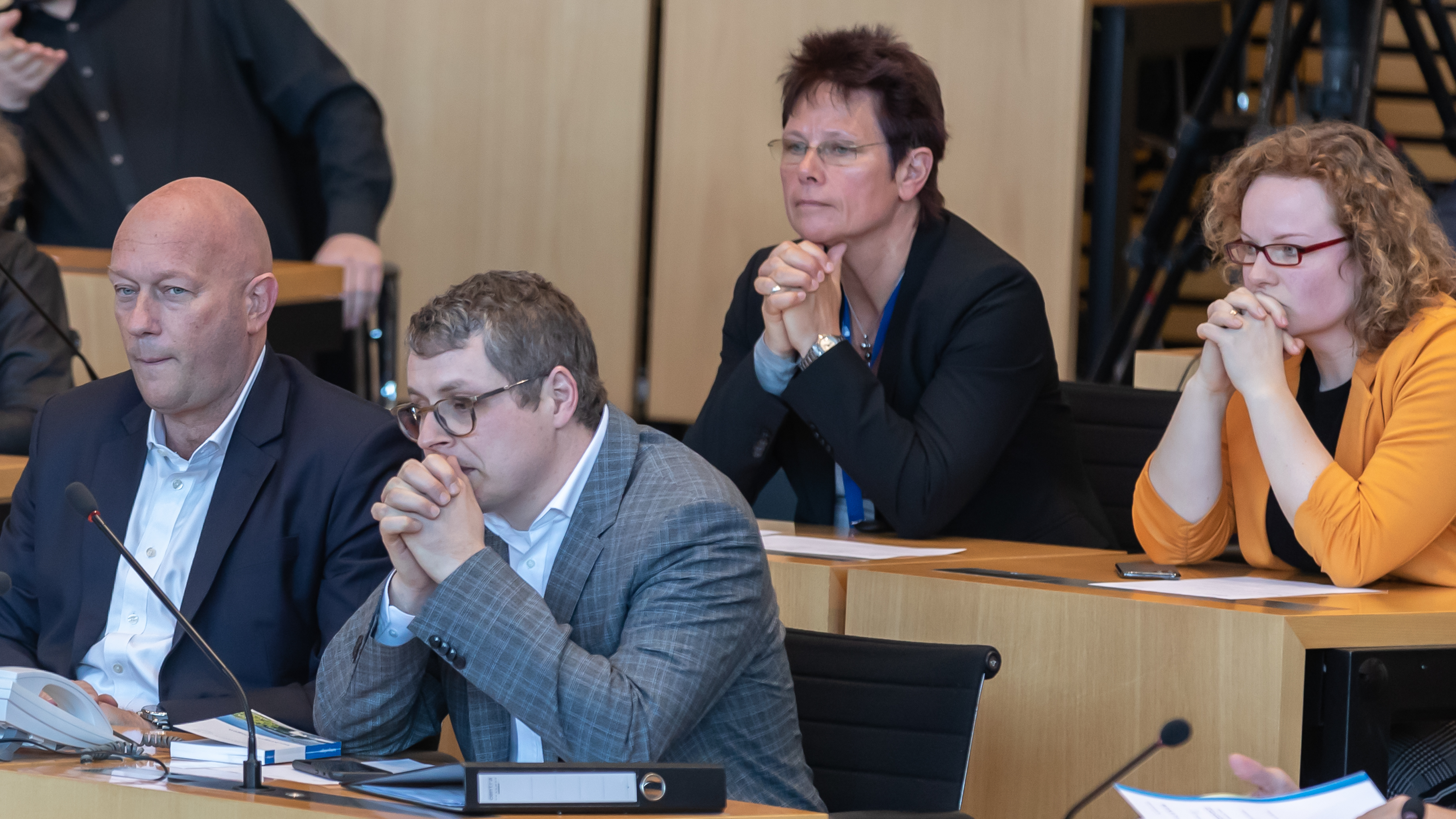 Thüringer Landtag, Wahl des Ministerpräsidenten: v.li.: Thomas L. Kemmerich (FDP, Landes- und Fraktionsvorsitzender in Thüringen), Robert-Martin Montag (FDP, Generalsekretär und parlamentarischer Geschäftsführer in Thüringen), Ute Bergner (FDP), Franziska Baum (FDP); bei der Verkündung des Ergebnisses des 3. Wahlgangs